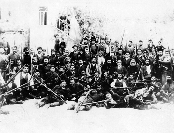 Révolutionnaires lors de la révolte de Therissos, à Therissos, 1905